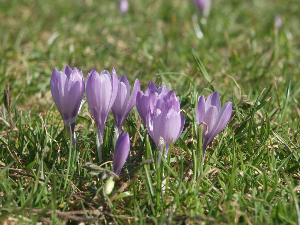 Crocus vernus subsp. albiflorus, Allgäuer Alpen, Germany